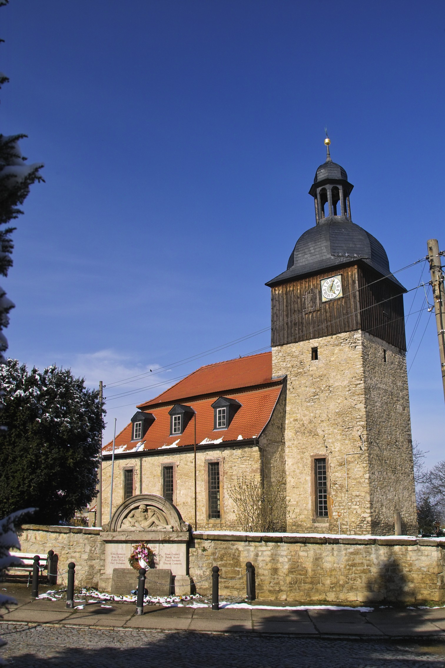 Dorfkirche in Obernissa, Thüringen, Obernissa church, Thuringia, Germany